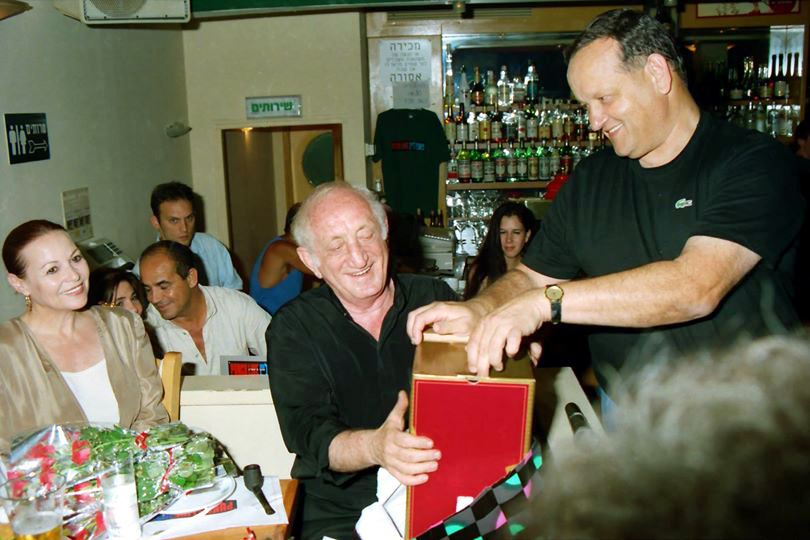 דן שילון במסיבה לרגל תכניתו של יעקב (יענקלה) אגמון "בירה ומצב רוח" בשילוב עם מסיבת הפתעה ליום הולדתה של גילה אלמגור בפאנץ' ליין